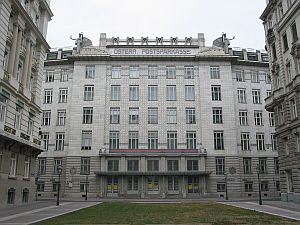 Wiener Postsparkasse by Otto Wagner